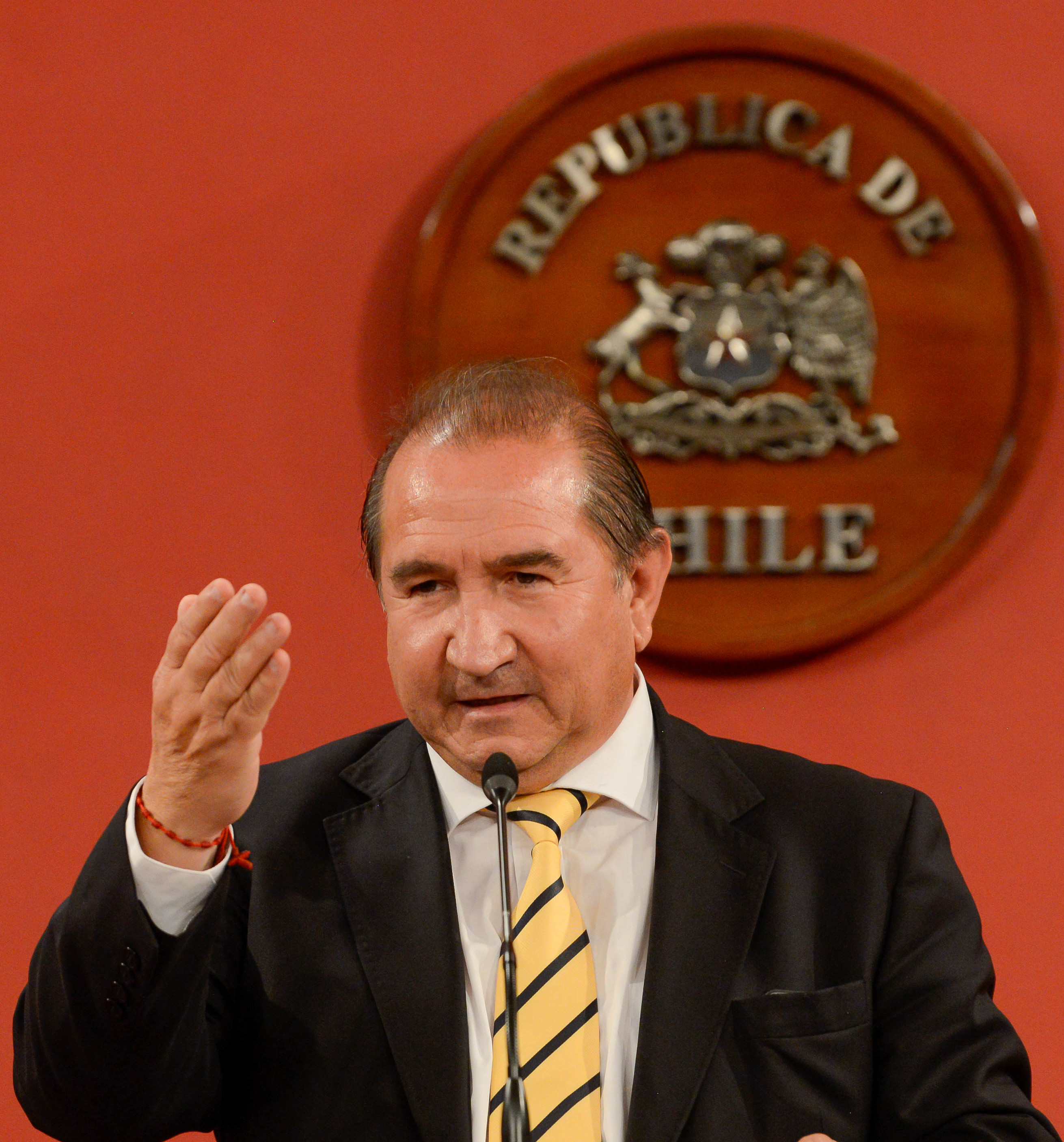 Ministra Cecilia Pérez encabeza la celebración del Día del Locutor